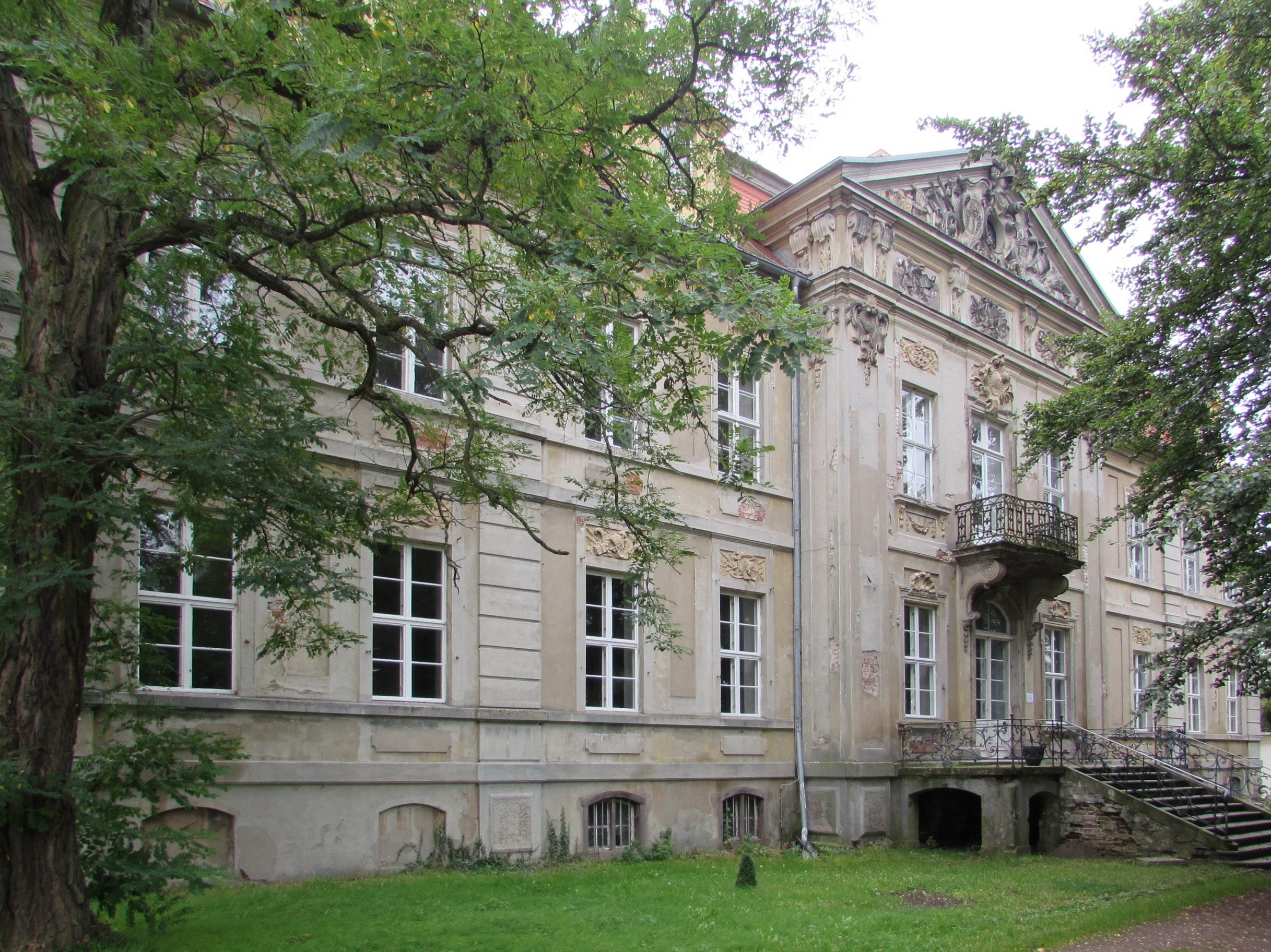 rückseite gutshaus roskow